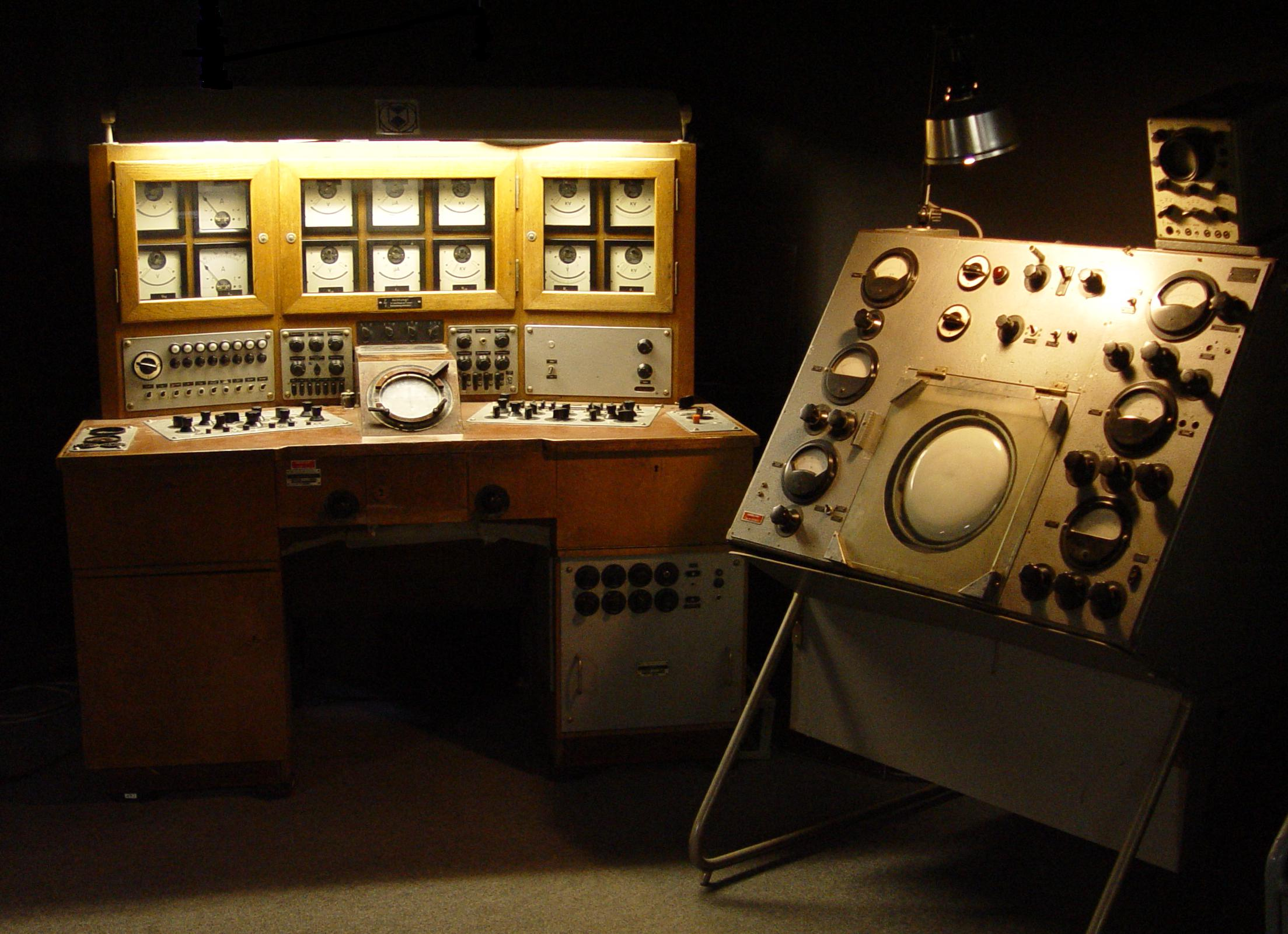 Messtisch für Oszillographenröhren neben Messtisch für Radarröhren